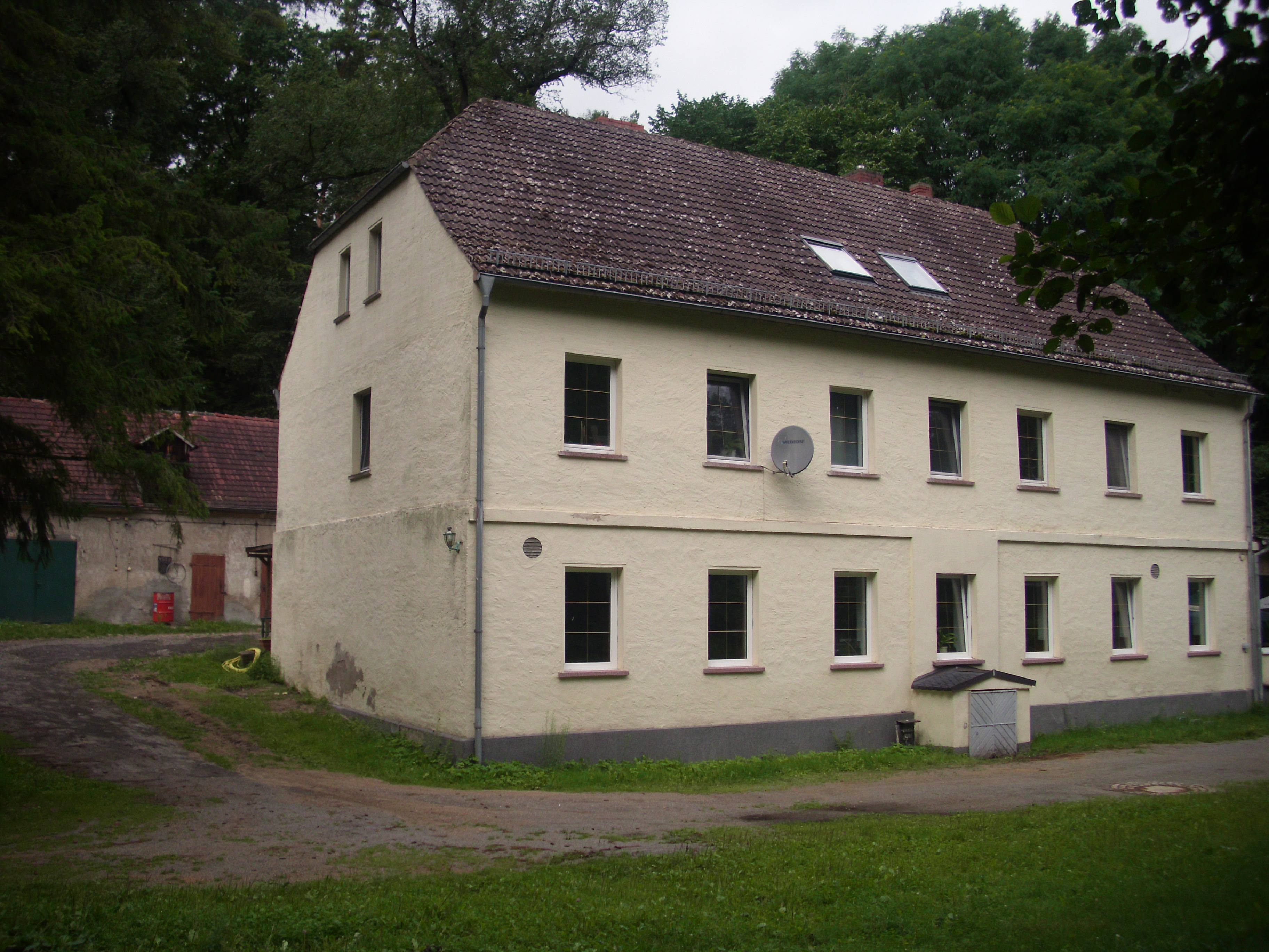 Gutshaus Kupferhammer mit Nebengebäude, Schlaubetal